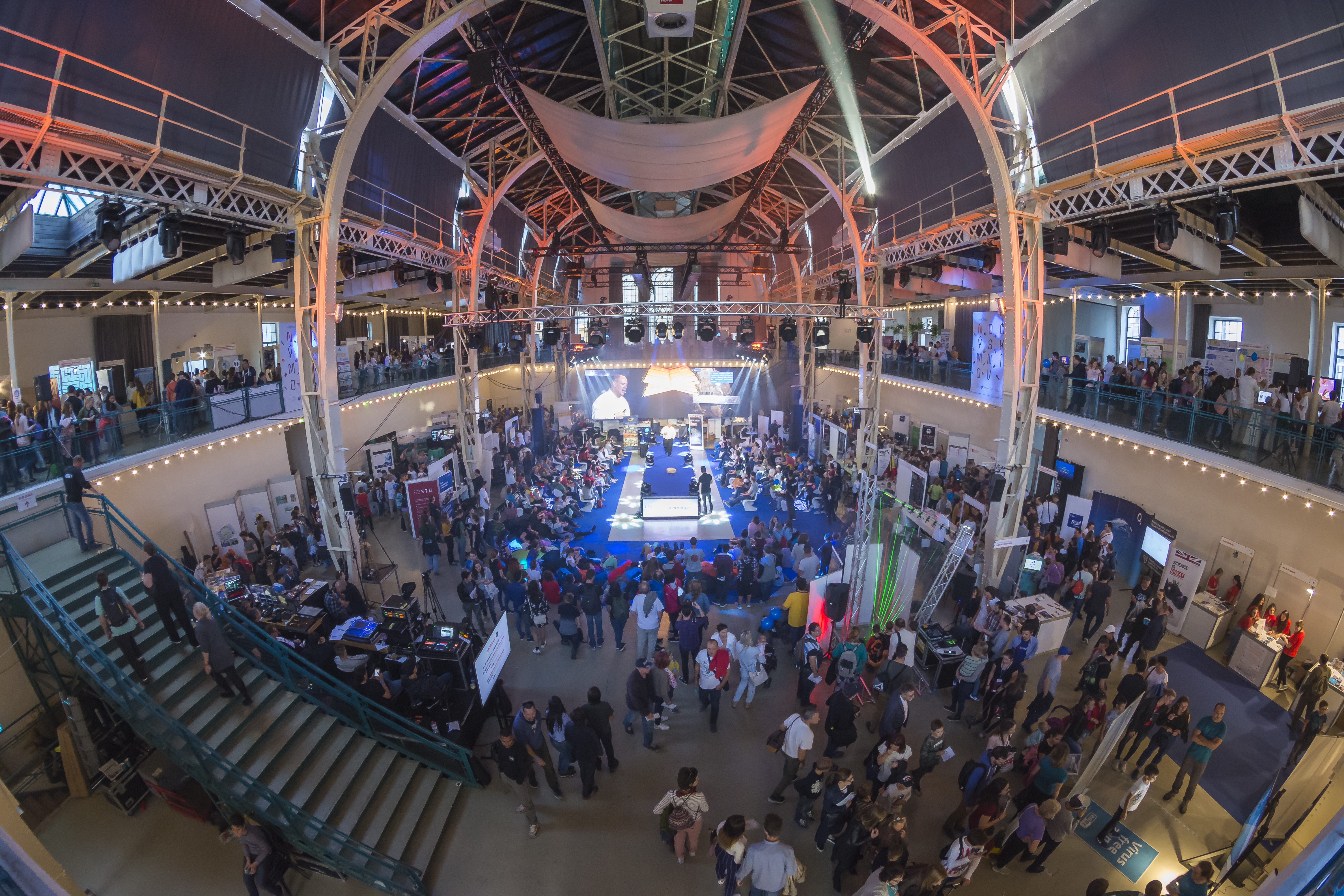 Podujatie v Starej Tržnici v Bratislave v roku 2018.